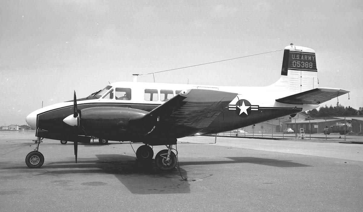 L-23FsideCrissy60